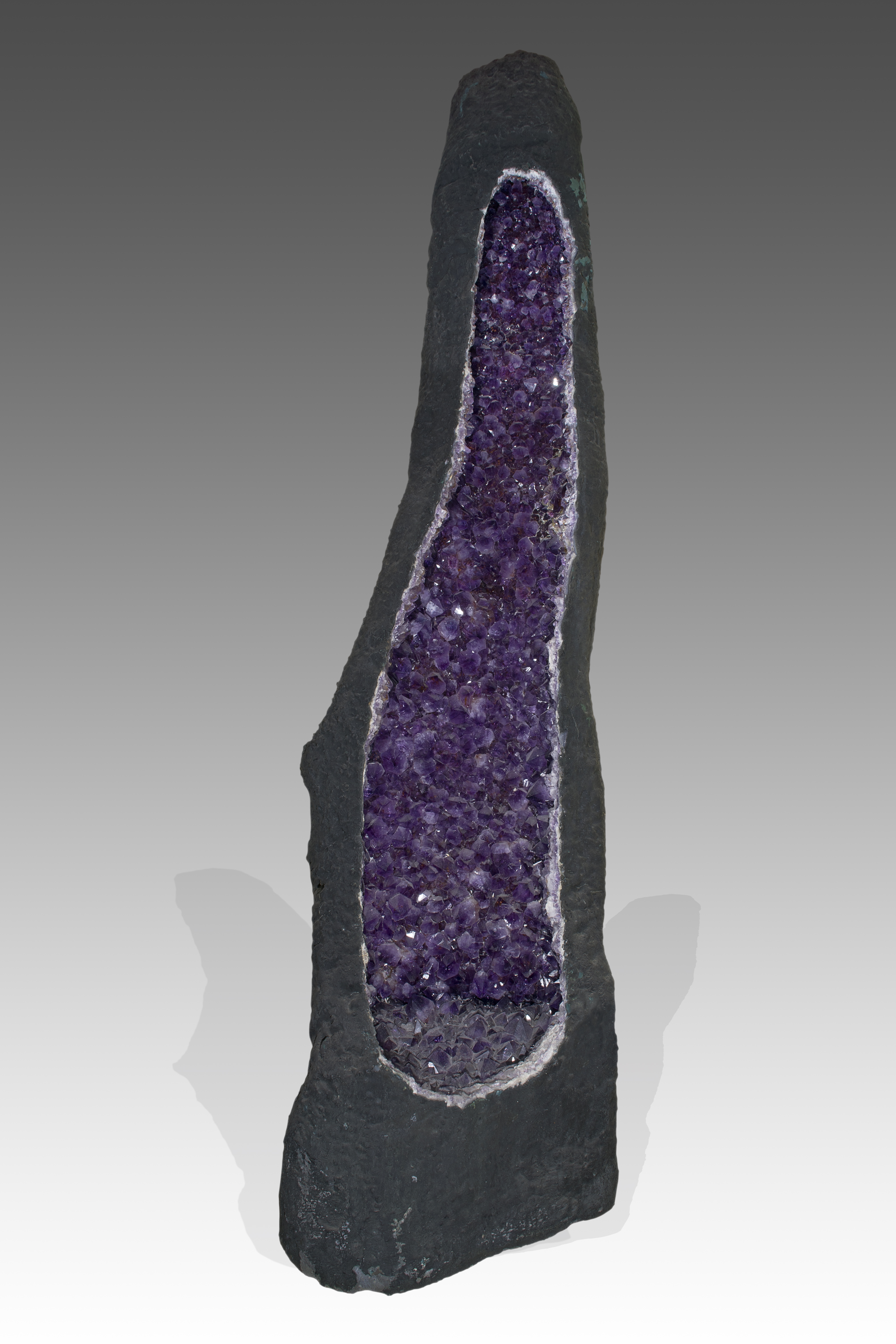 Quartz (Var.Amethyst) Locality : Ametista do Sul, Alto Uruguai region, Rio Grande do Sul, Brazil Size : 150x44x39 cm - 189Kg Quartz (Var.Améthyste) Localité : Ametista do Sul, région d’Alto Uruguai, Rio Grande do Sul, Brésil Size : 150x44x39 cm - 189Kg